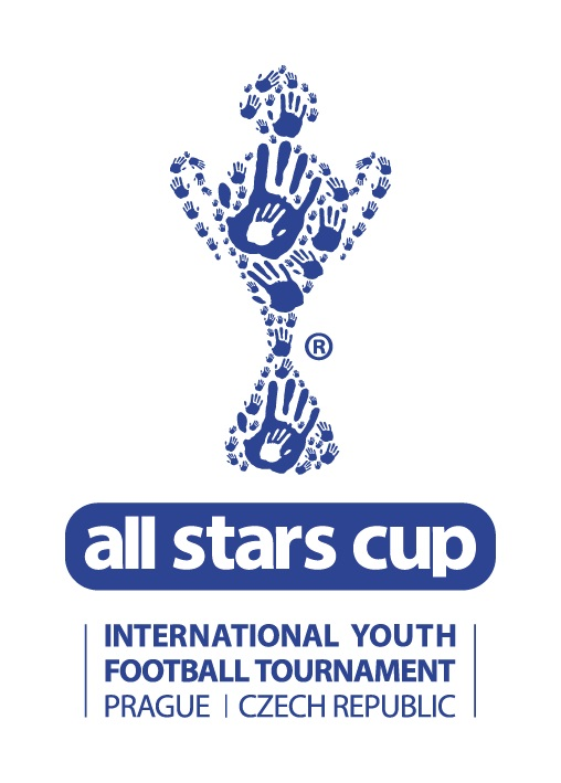 fotbal, mezinárodní turnaj